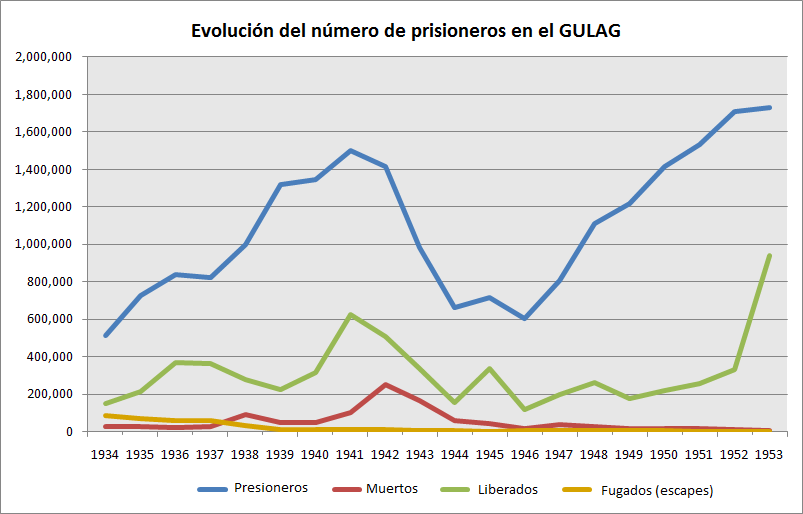 Versión en español del archivo "Gulag Prisoner Stats 1934-1953". Evolución del sistema Gulag y sus prisioneros según los archivos desclasificados de la Unión Soviética.